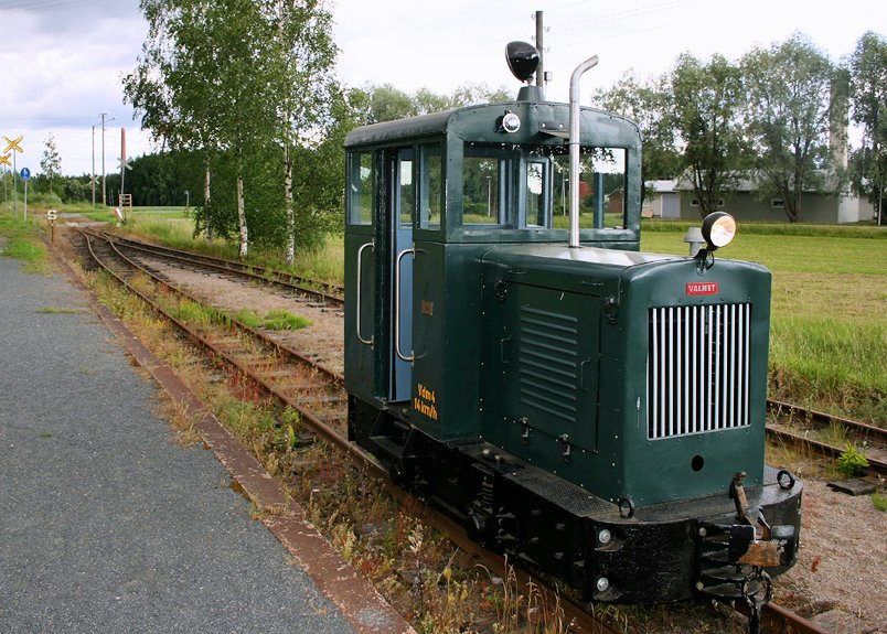 Move4-kapearaidedieselveturi (ex-A Ahlström Oy Varkauden tehtaat) Jokioisten asemalla 14. heinäkuuta 2007.